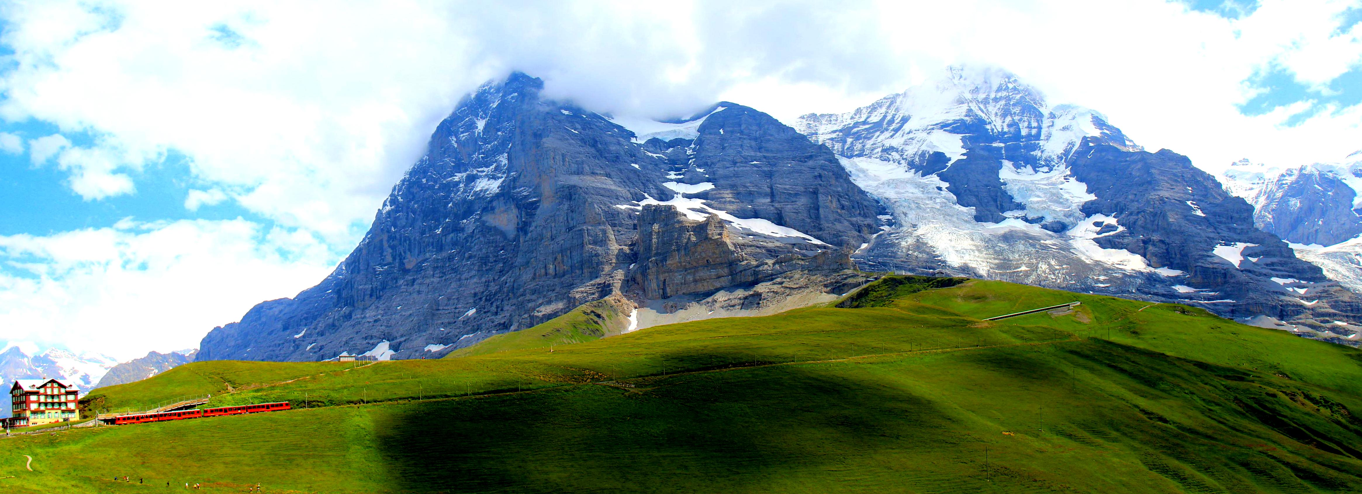 Eiger